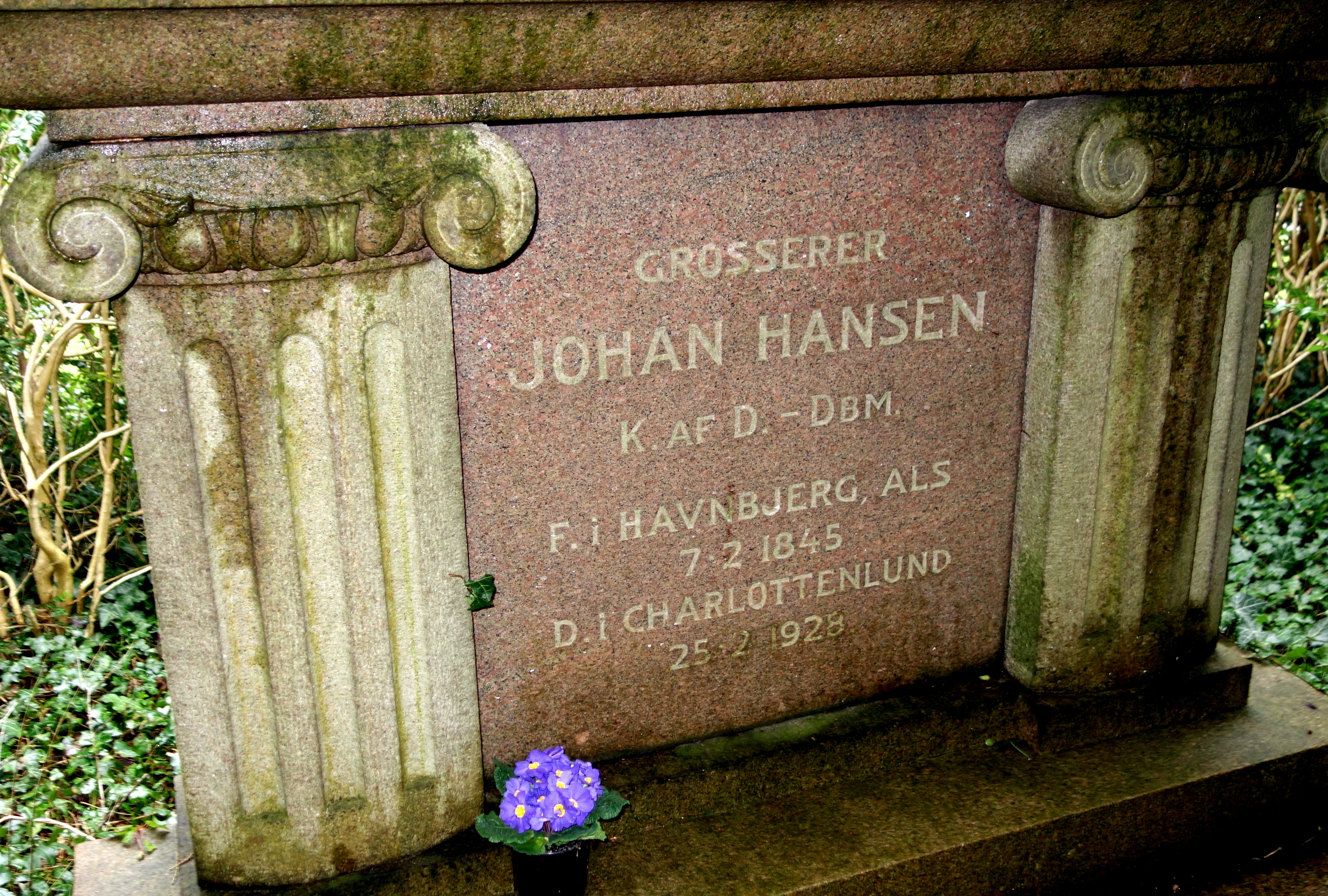 Gravsten for grosserer Johan Hansen